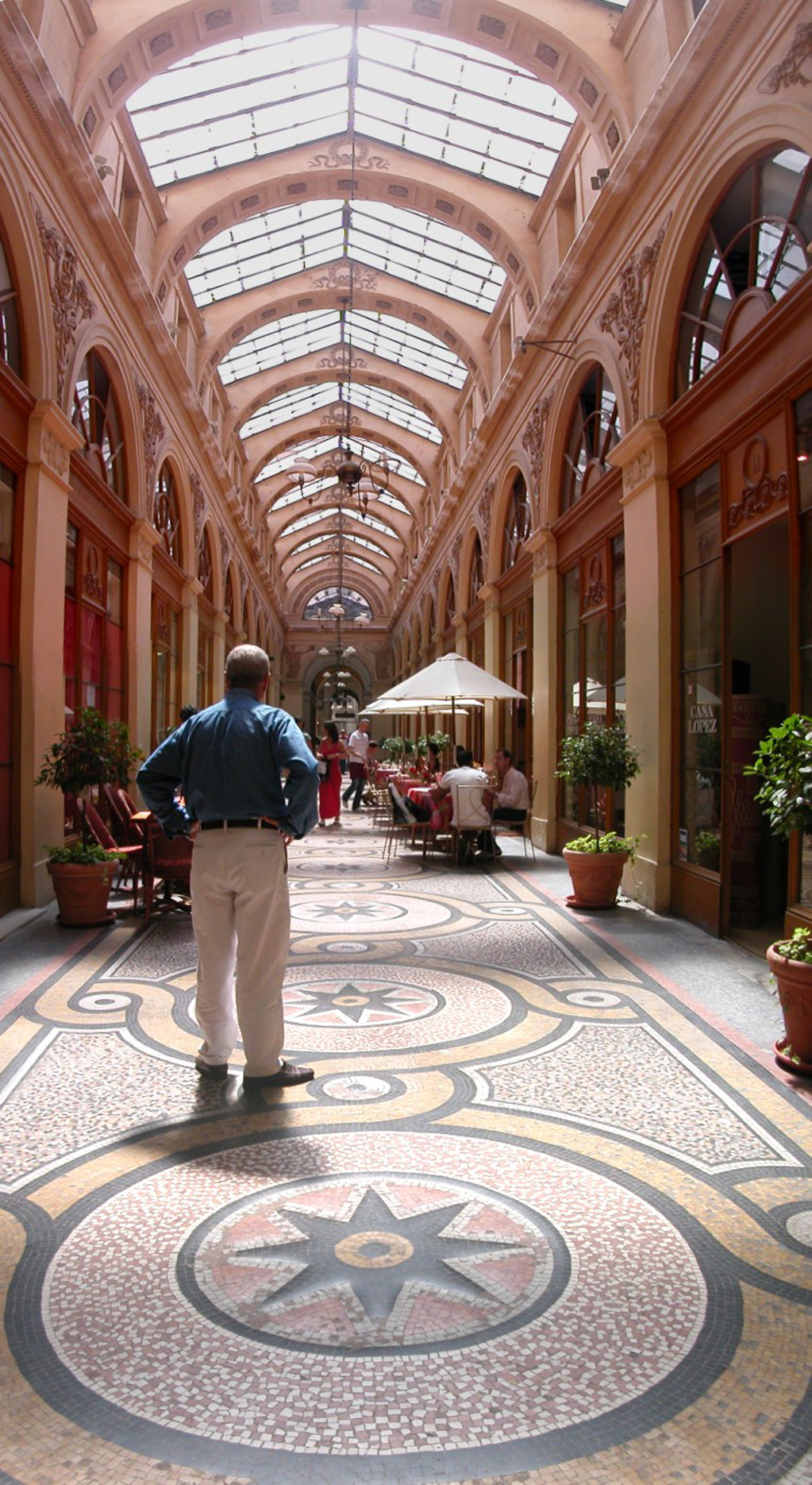 Panorama de Gal. Vivienne, Paris. Shopping Arcade : Galerie Vivienne (1823)